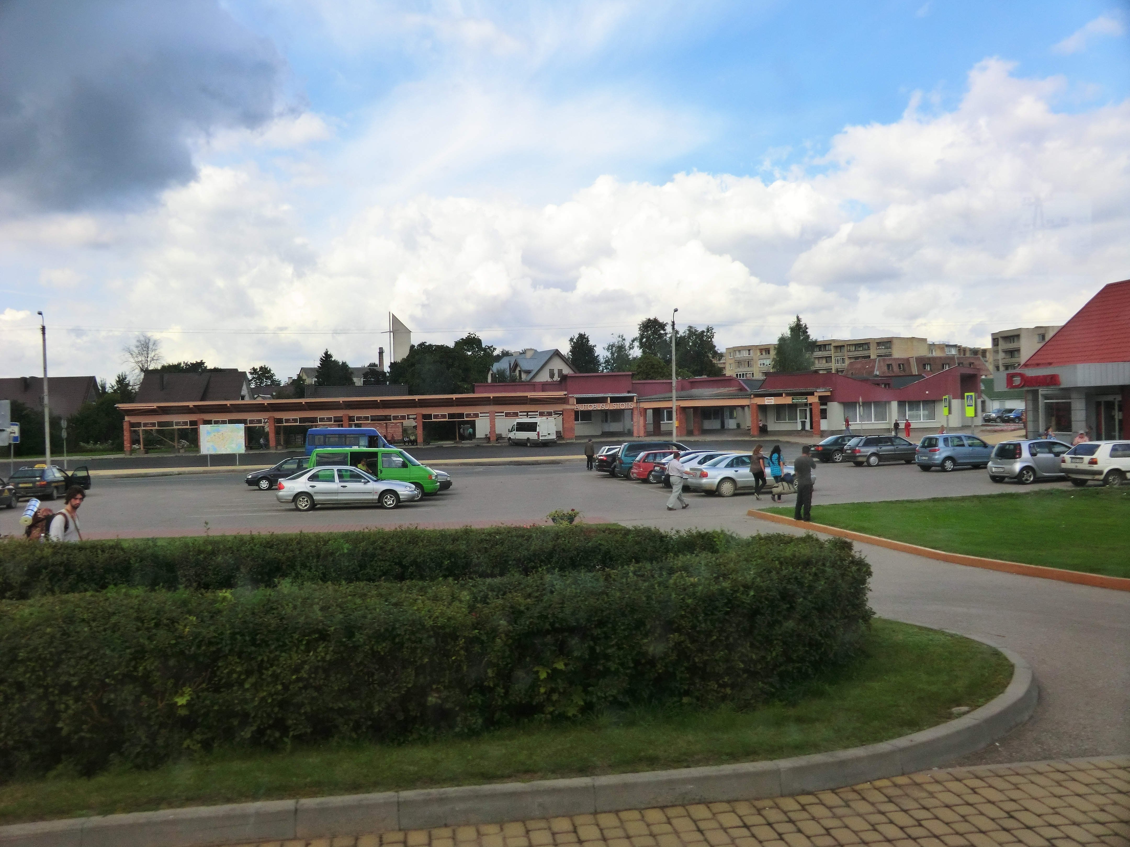 Ignalina, Lithuania